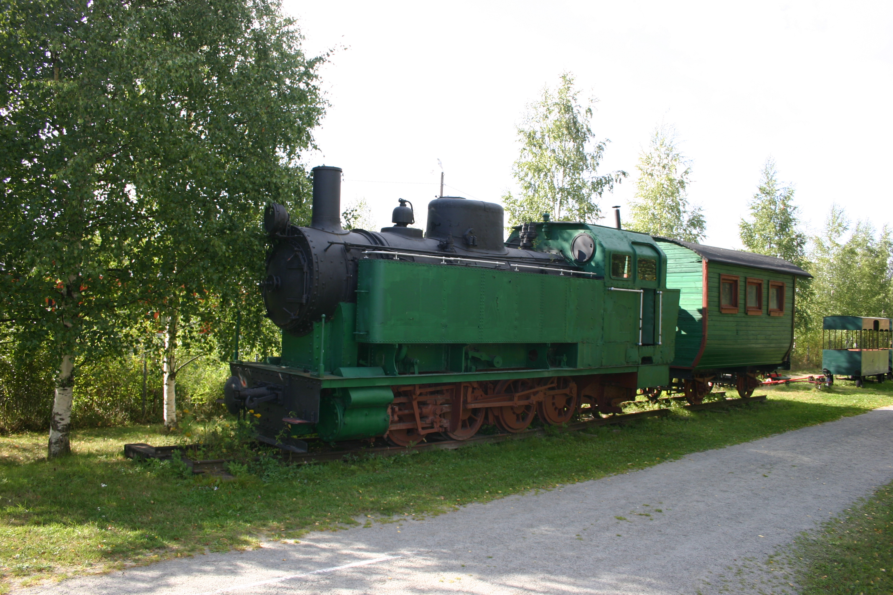 Virkkalan–Ojamon rautatien kolmosveturi ja ns. saunavaunu Haapamäen höyryveturipuistossa Keuruulla